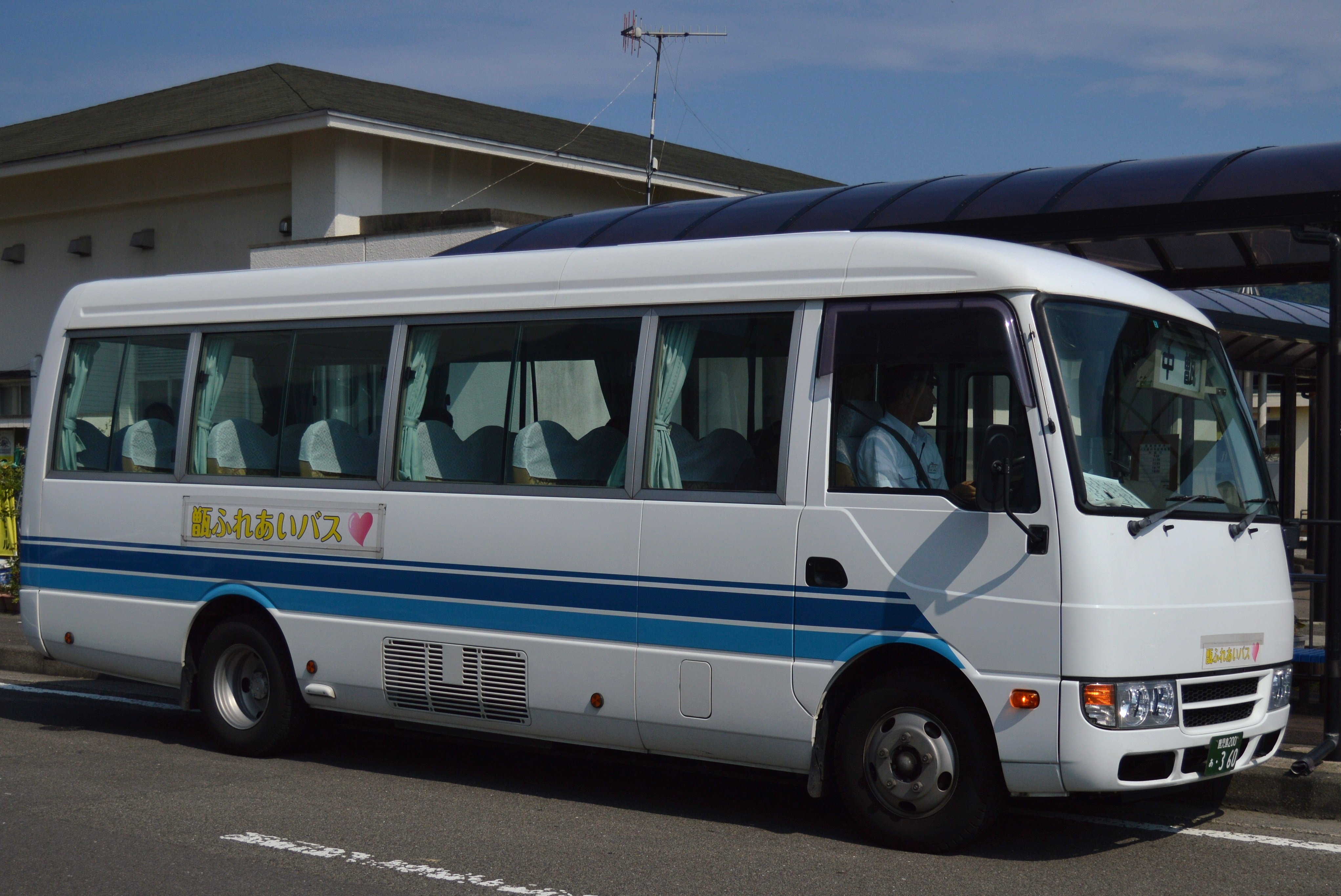 鹿児島県薩摩川内市の上甑島、コミュニティバスのふれあいバス